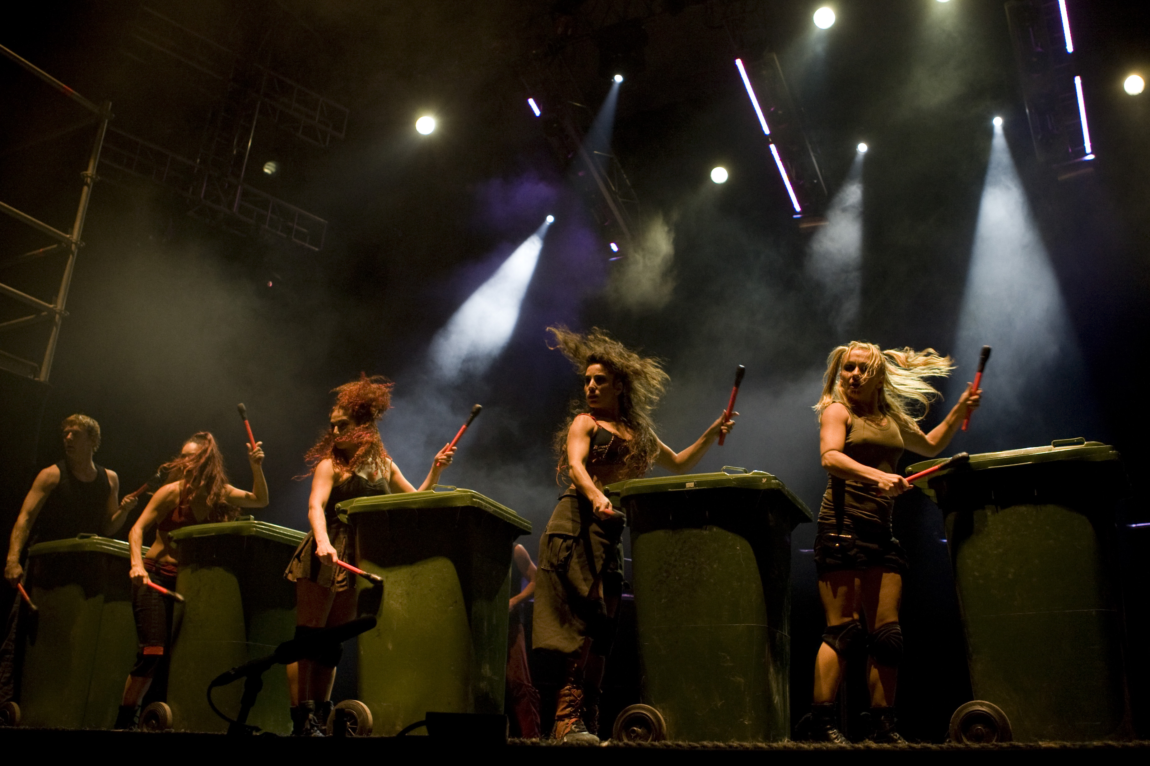 Mayumana en la inauguracion del espacio Movistar de Barcelona .